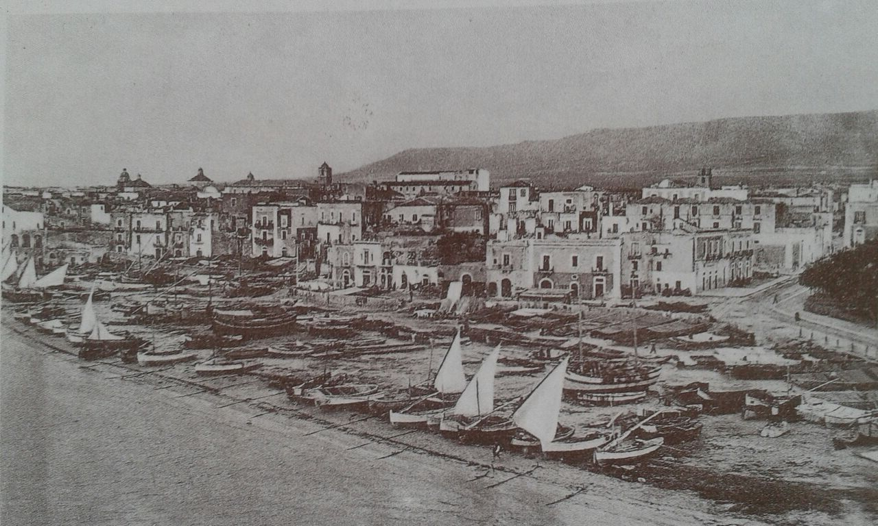 Panoramica del centro di Manfredonia nel primo decennio del 1900.